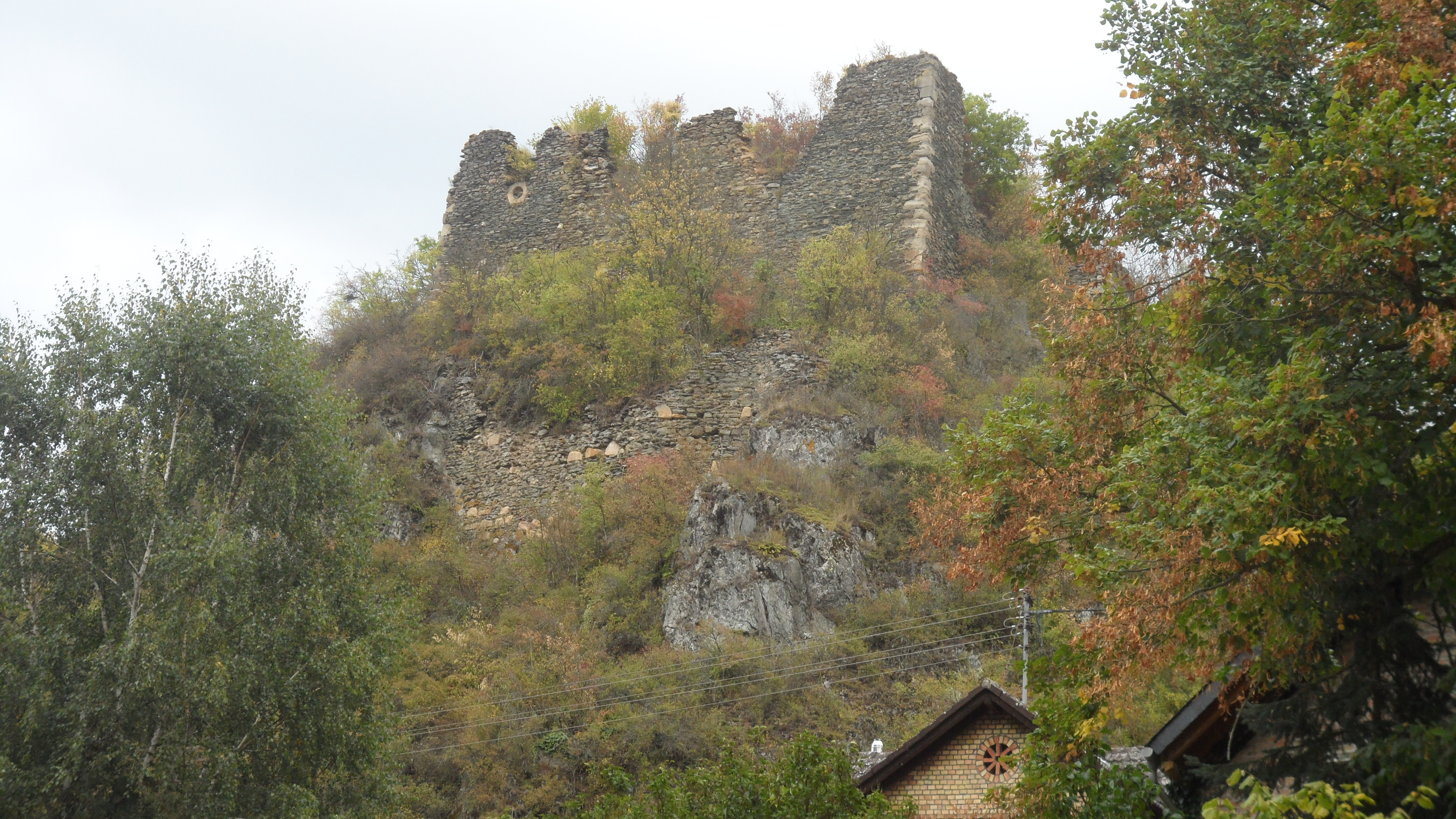 Argenschwang, Landkreis Bad Kreuznach, Denkmalzone Burgruine Rosenburg (Burg Argenschwang).